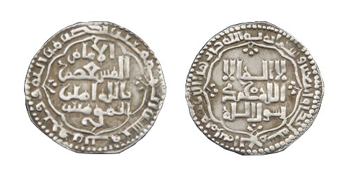 Dinar Abbasside frappé à Bagdad durant le reigne d'al-Musta`sim bi-llah en l'an 641 AH